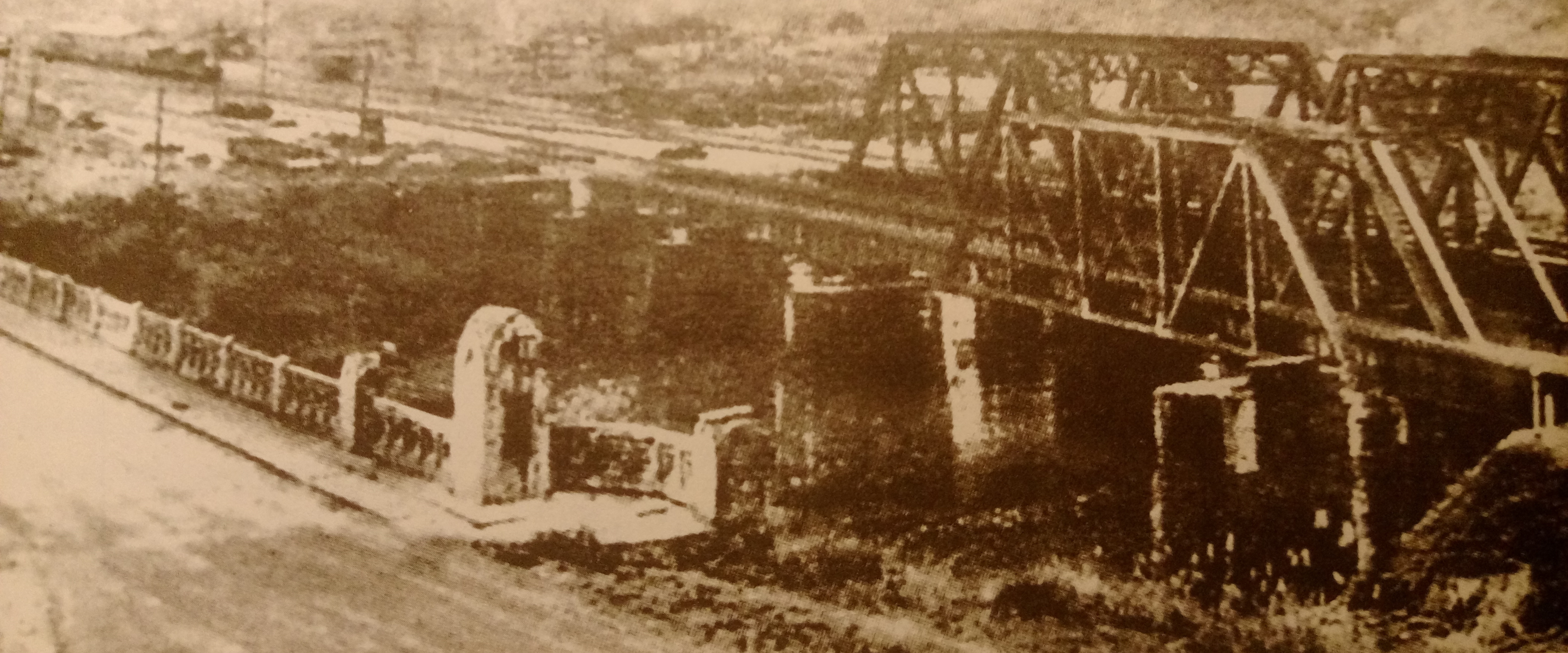 八堵車站附近跨越基隆河鐵路橋與公路橋。